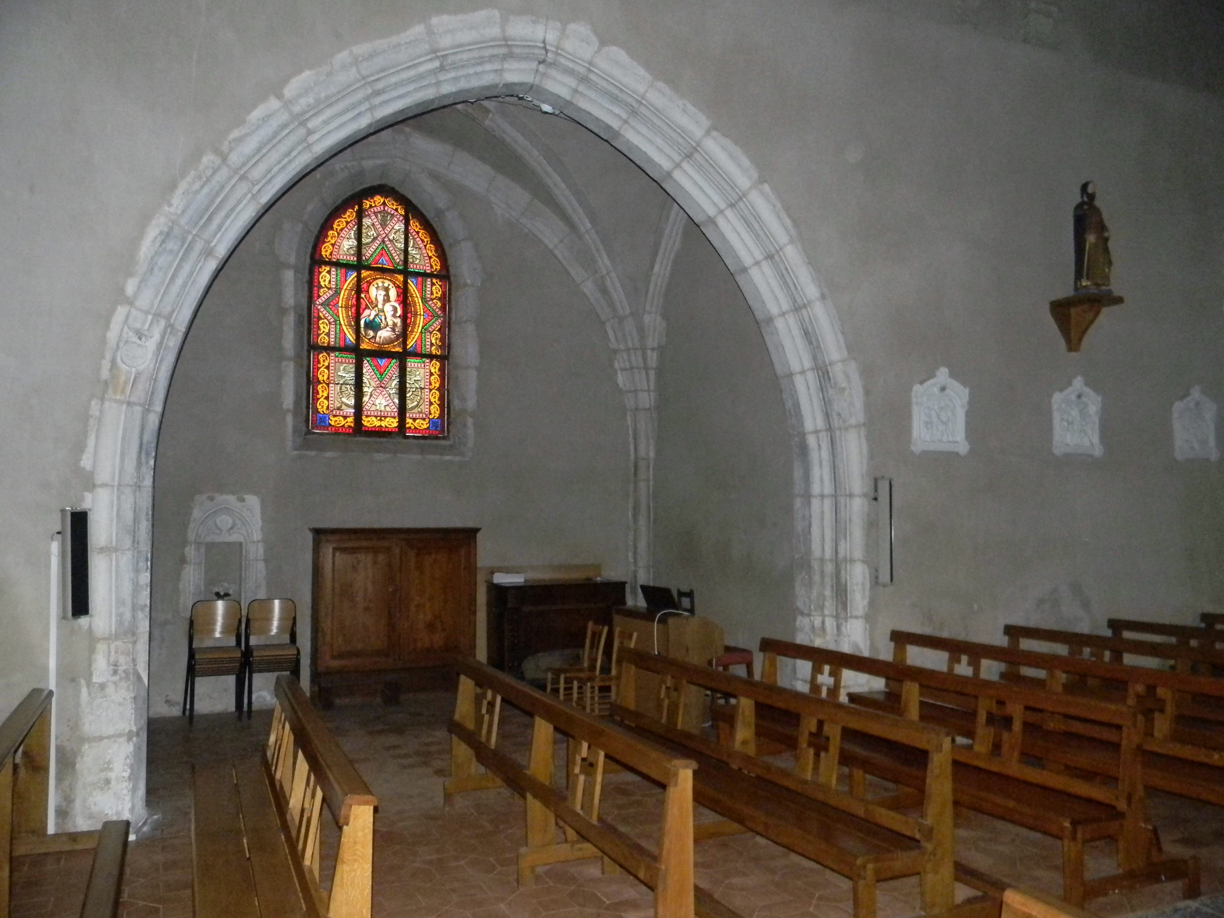 Transept droit de l'église de Balan, dans l'Ain. La statue en haut à droite représente Saint Jacques.